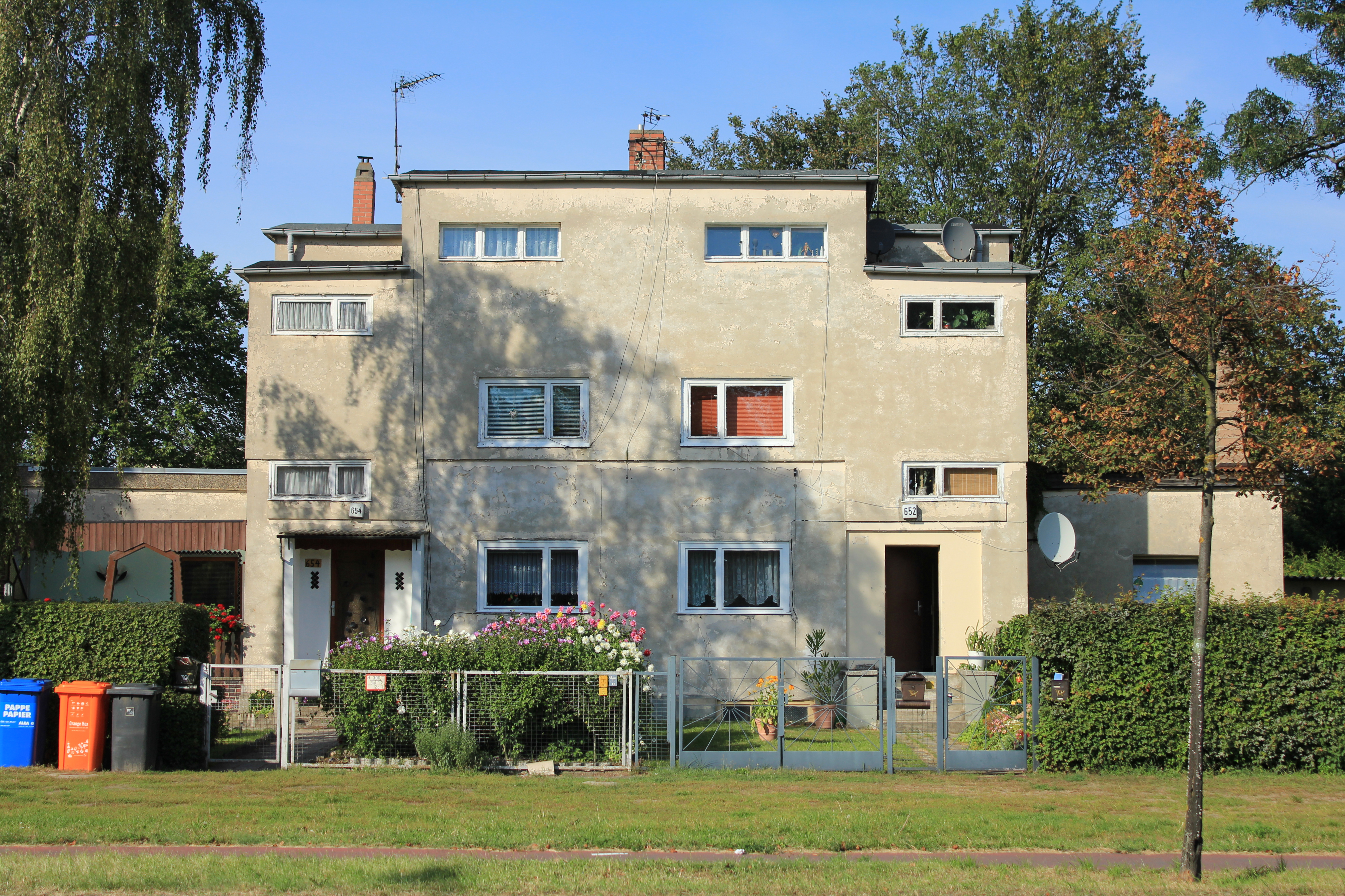 Berlin, Flachbausiedlung Staaken